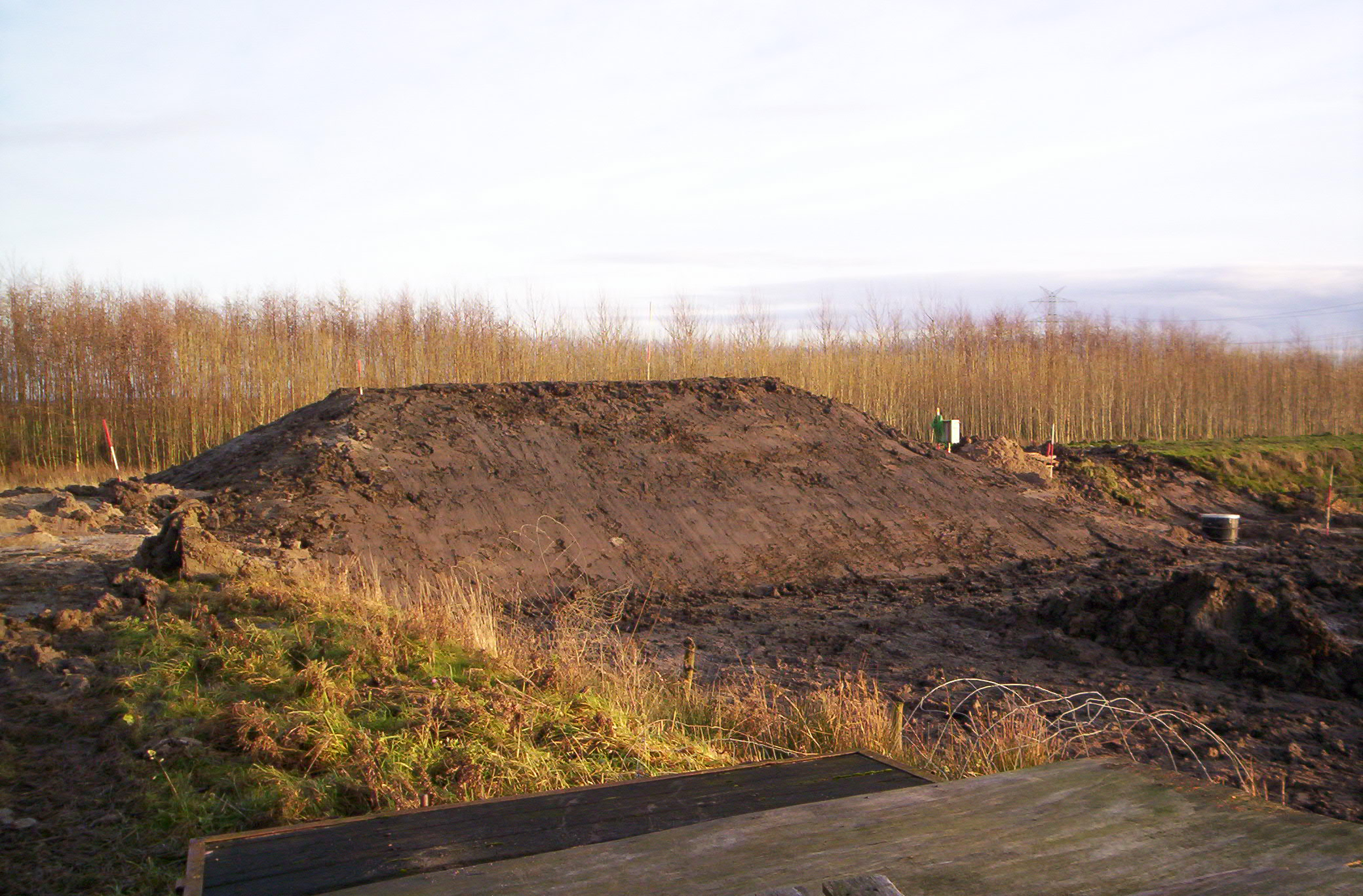 De eerste dijk die wordt getest. Deze dijk is veertien meter breed en, vanaf de voet, vier meter hoog. In de zomer van 2007, wanneer de dijk begroeid is, zal het bezwijken wanneer een zogenaamde golfoverslag simulator vanaf de top van de dijk letterlijk bakken met water over de dijk uitstort. In de proefdijk zitten sensoren die vocht, waterdruk en geluid registreren.